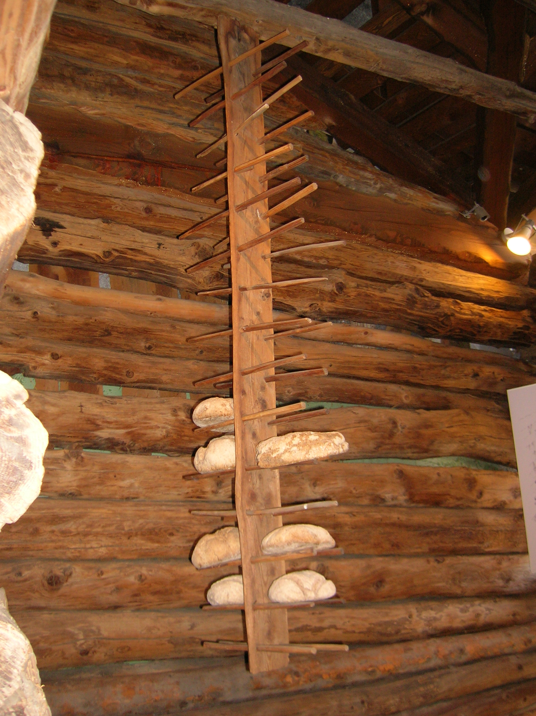 Ratélé, rastrelliera di legno appesa per la conservazione del pane (spesso nero e di segale) al Museo Petit Monde. Il Museo Petit Monde di Triatel (frazione di Torgnon, Valle d'Aosta, Italia) si compone di un rascard, una grange e un granier restaurati ad ospitare un'esposizione sulla vita rurale (agro-pastorale) di montagna.